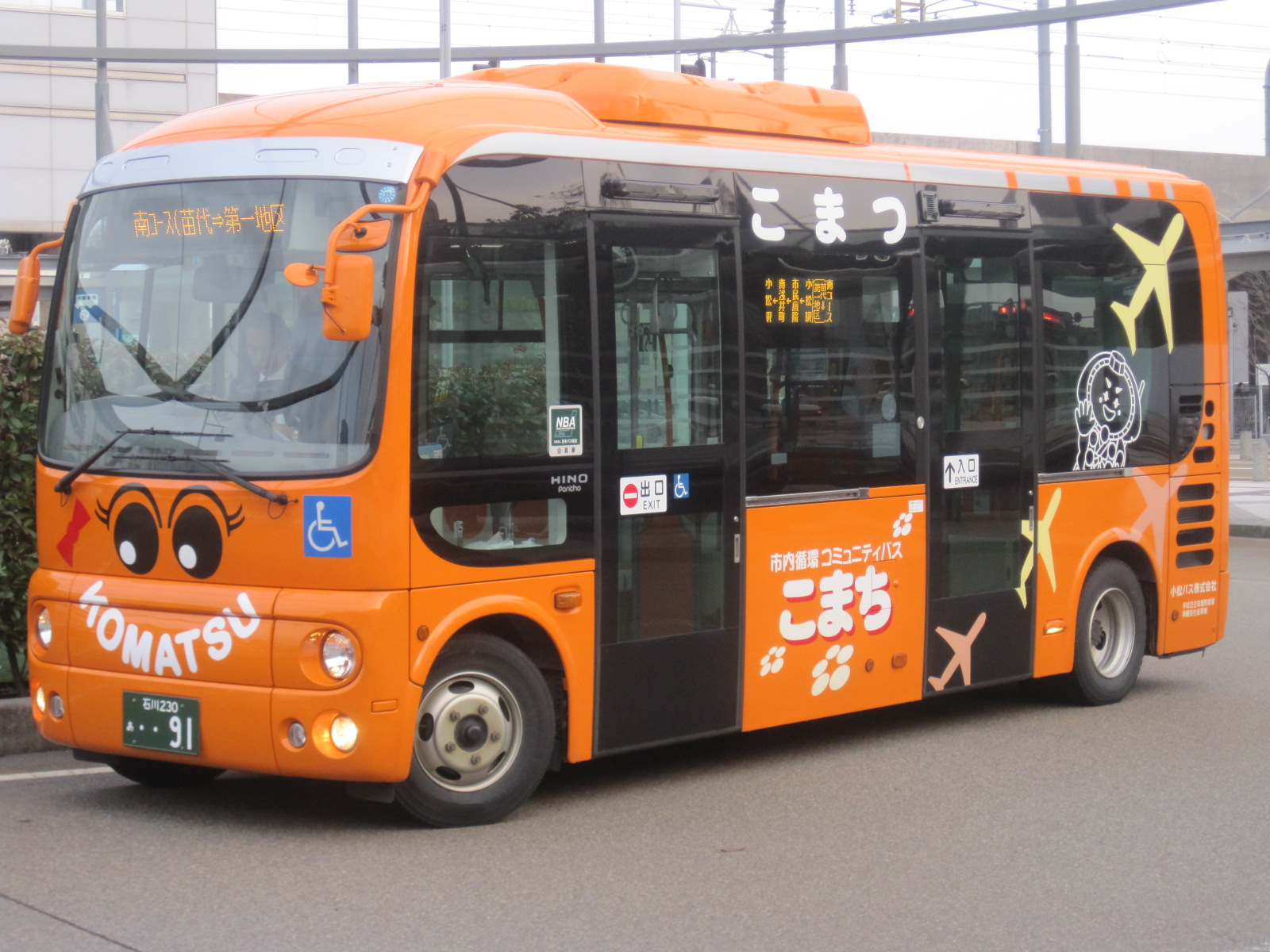 小松バスが運行している市内循環コミュニティバス。「こまち」という愛称があり、車体の色から「オレンジこまち」と呼ばれている。